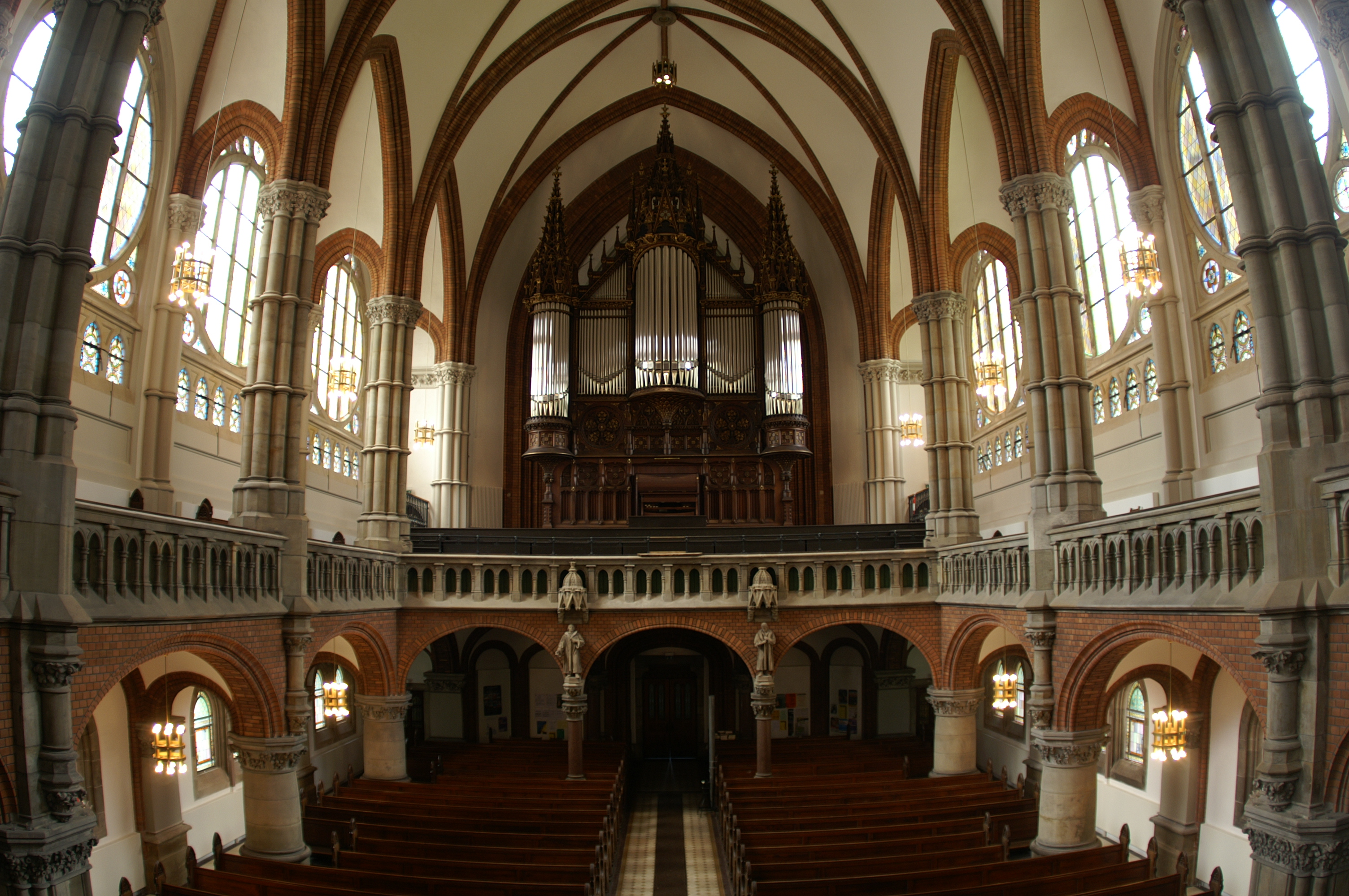 Ladegast-Jehmlich Orgel St. Petrikirche nach Restaurierung 2008